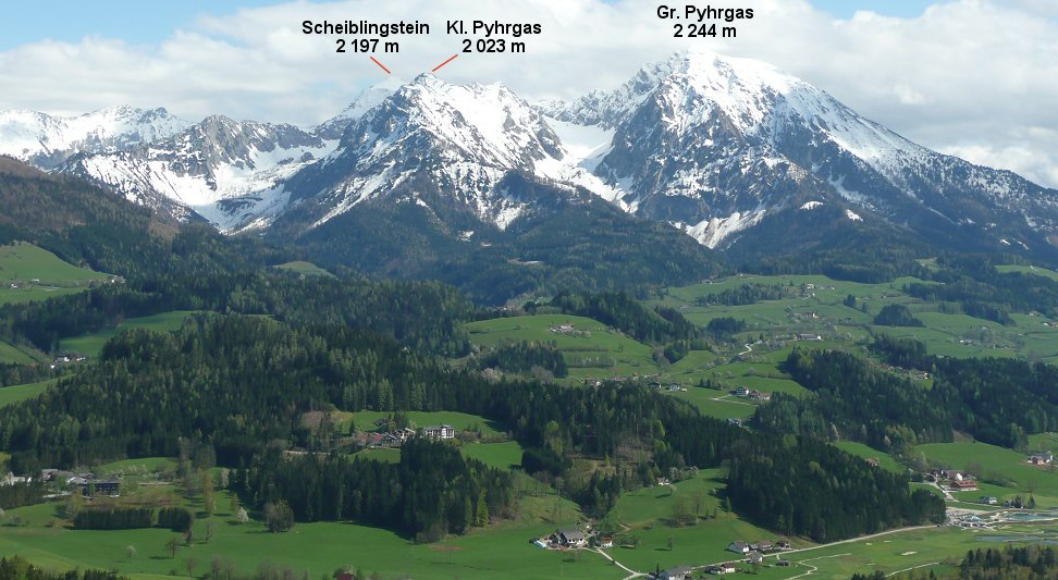 Haller Mauern - Blick vom Wurbauerkogel in Windischgarsten